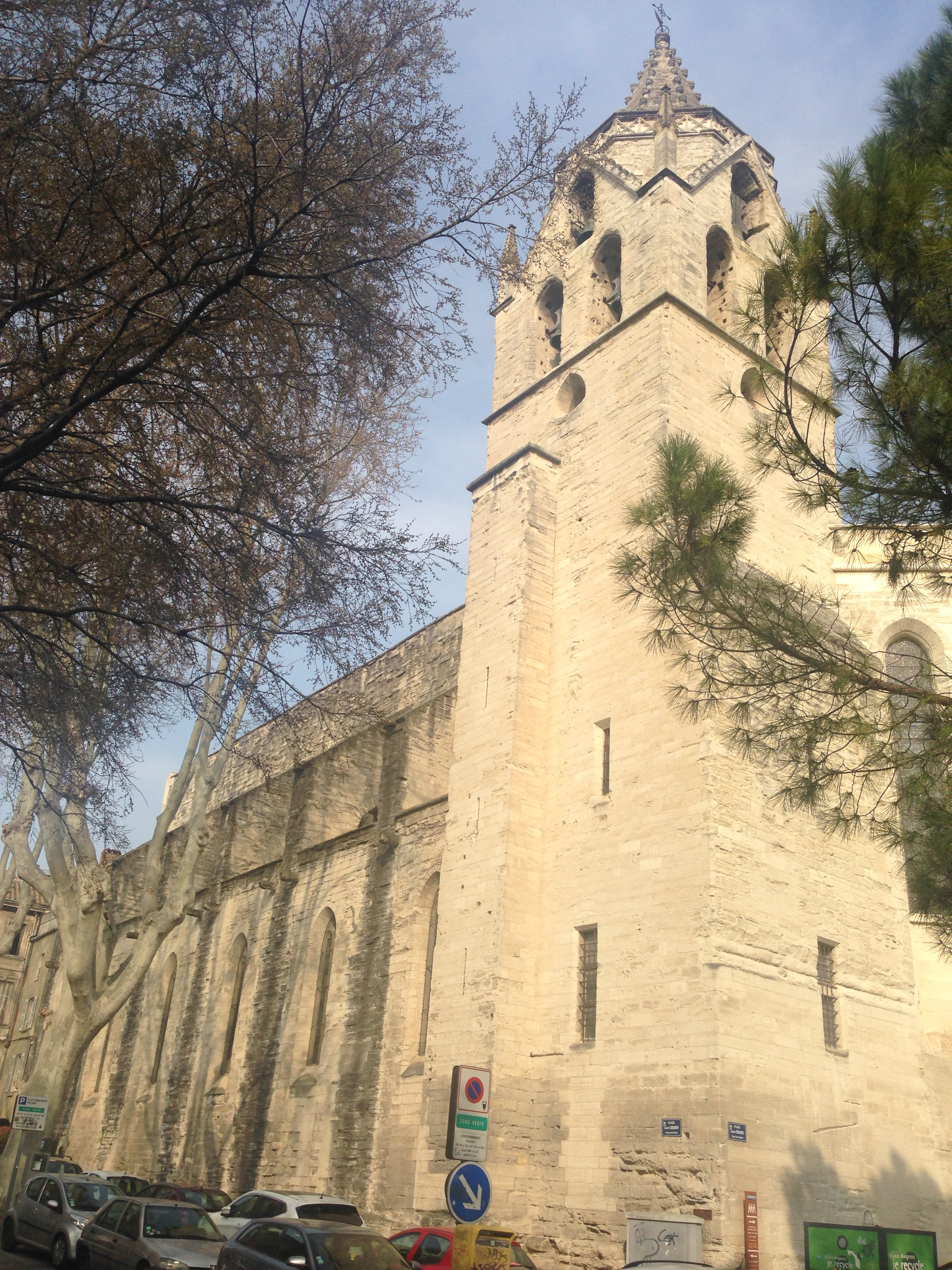 Collégiale saint Didier en Avignon (XIVe siècle), vue de la place homonyme, côté sud.